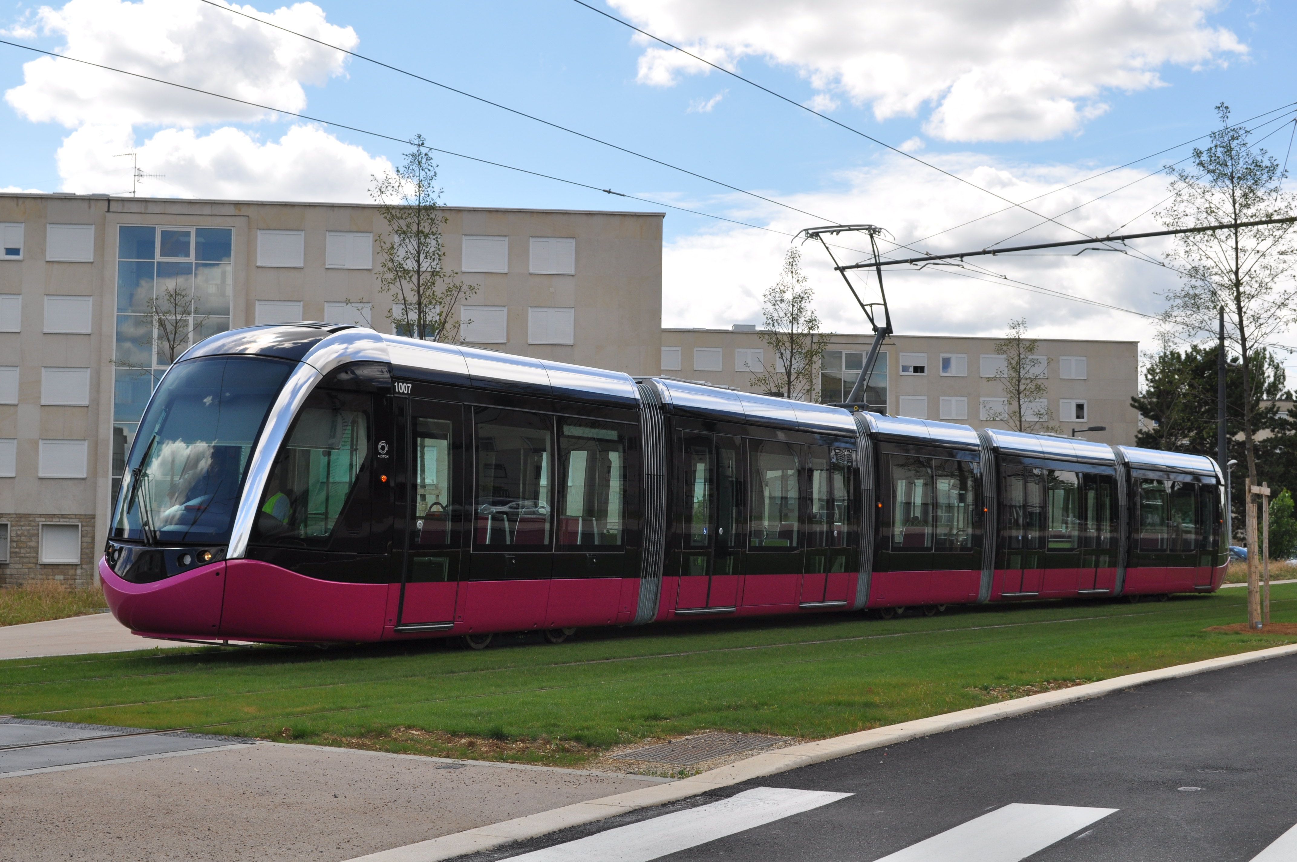 Essais du tramway - station Université - à Dijon (Côte-d'Or). Unknown